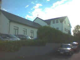 De Svedse kerk op Eigenbrakel, naar Waterloo. Église suédoise de Braine-l'Alleud. Svenska kyrkan i Eigenbrakel, Belgien.